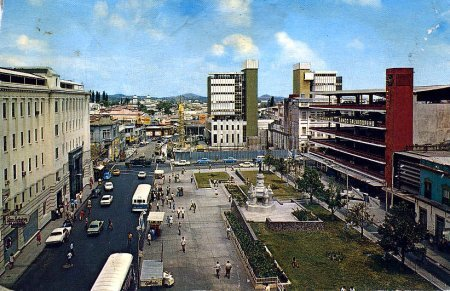 Plaza Morazán vista desde el teatro nacional